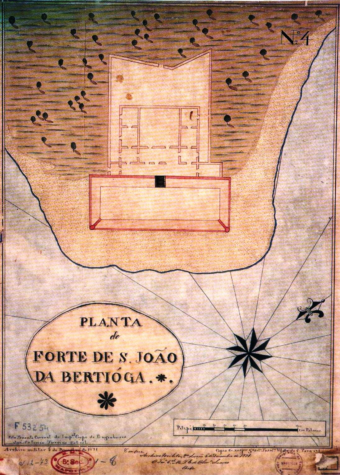 "Planta do Forte de S. João da Bertióga" pelo Tenente-coronel do Imperial Corpo de Engenheiros José António Teixeira Cabral.